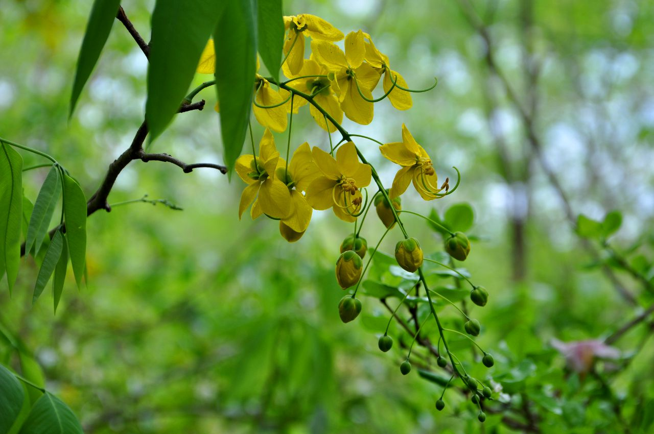 Canéfier, canéficier ou cassier. Grappe de fleurs.